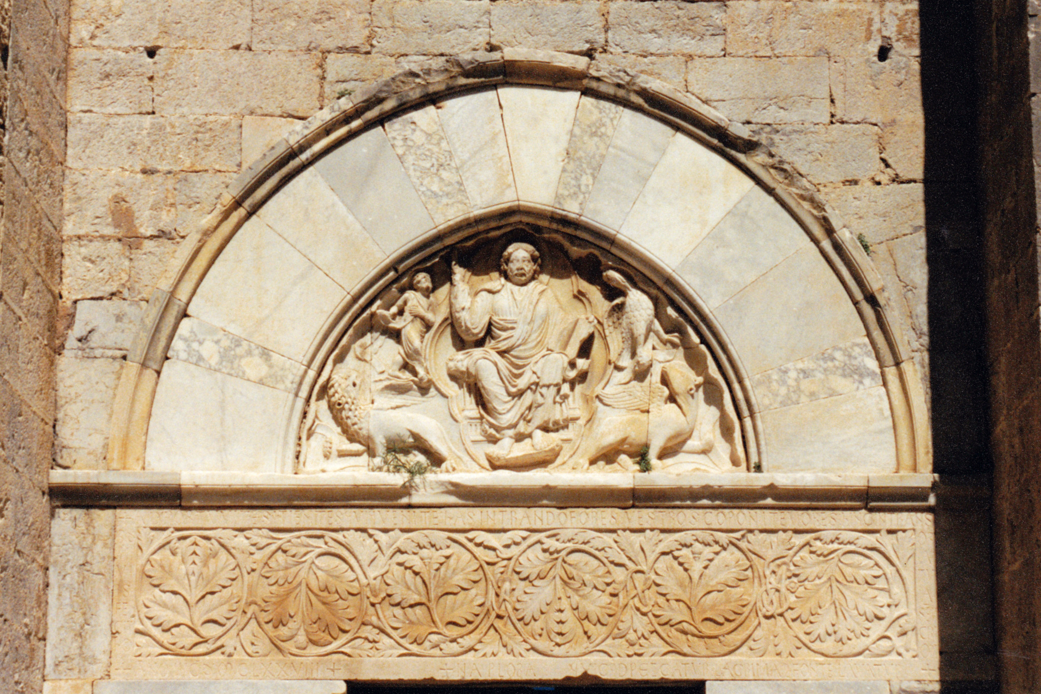 France - Languedoc - Hérault - Cathédrale Saint-Pierre-et-Saint-Paul de Maguelone